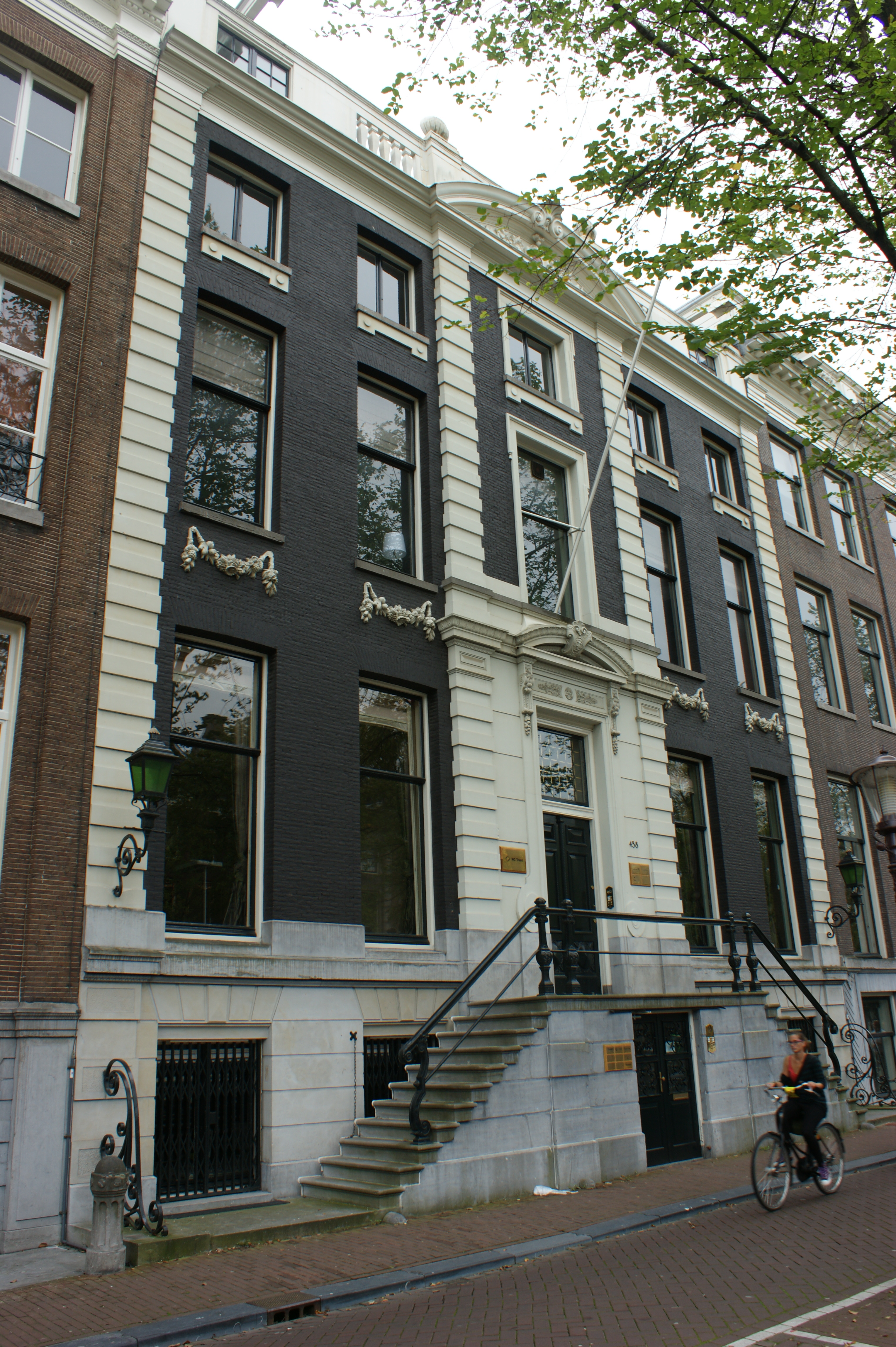 Amsterdam, Herengracht